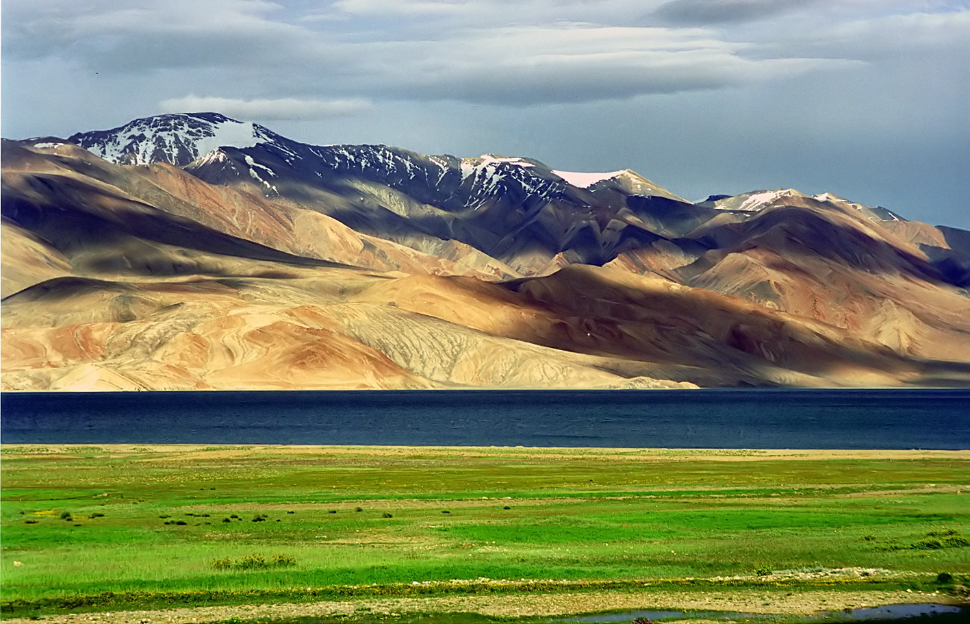 Mountains in Ladakh